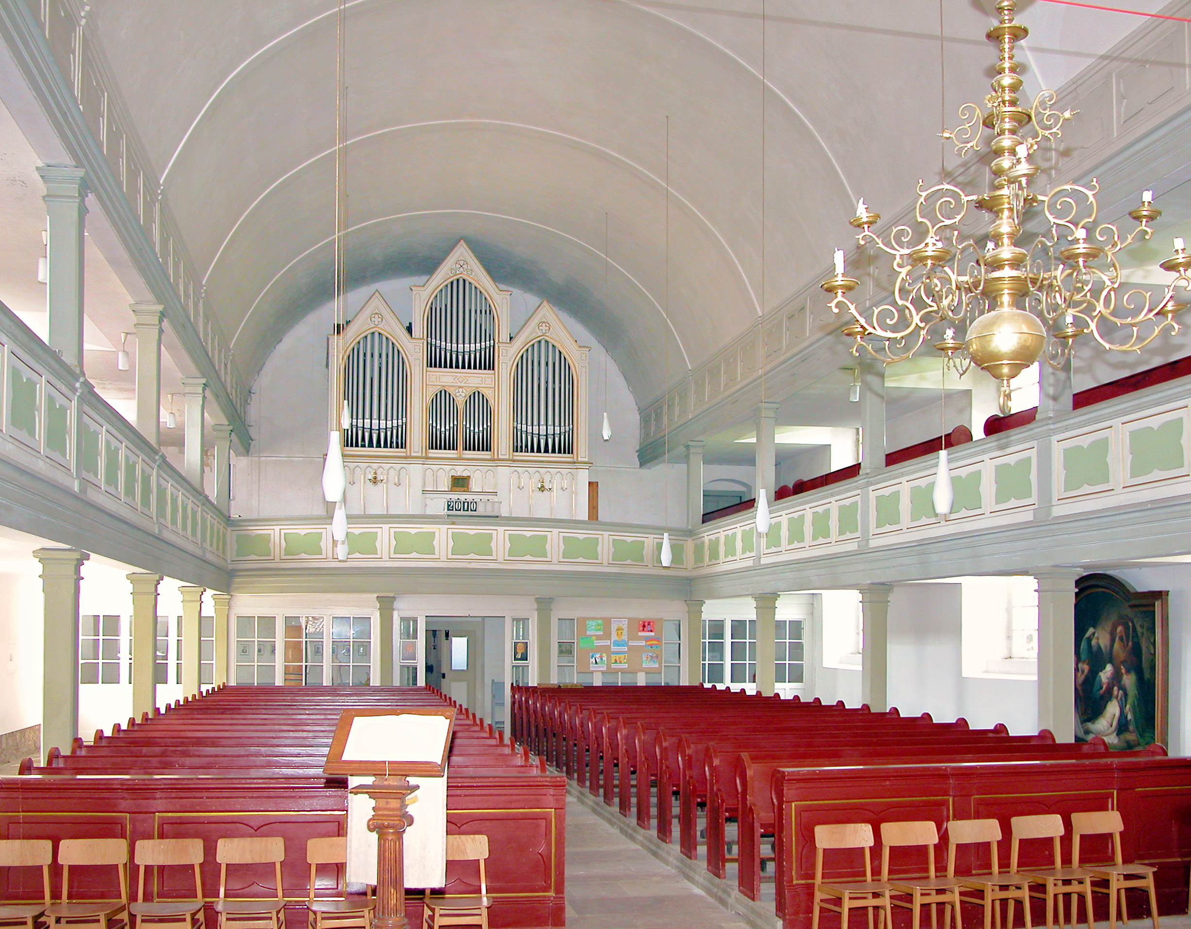 22.04.2010 09661 Etzdorf (Striegistal), Waldheimer Str. 17 (GMP: 51.050542,13.179933): Dorfkirche, erbaut 1865/66 nach Abbruch der alten Dorfkirche. Das "Altinventar" veräußerte man. So spielt die Etztdorfer Silbermann-Orgel von 1732/33 heute im Bremer Dom. Die heutige Orgel wurde 1867 von Johann Gotthilf Bärmig aus Werdau eingebaut. [DSCN41639.TIF]20100422045DR.JPG(c)Blobelt